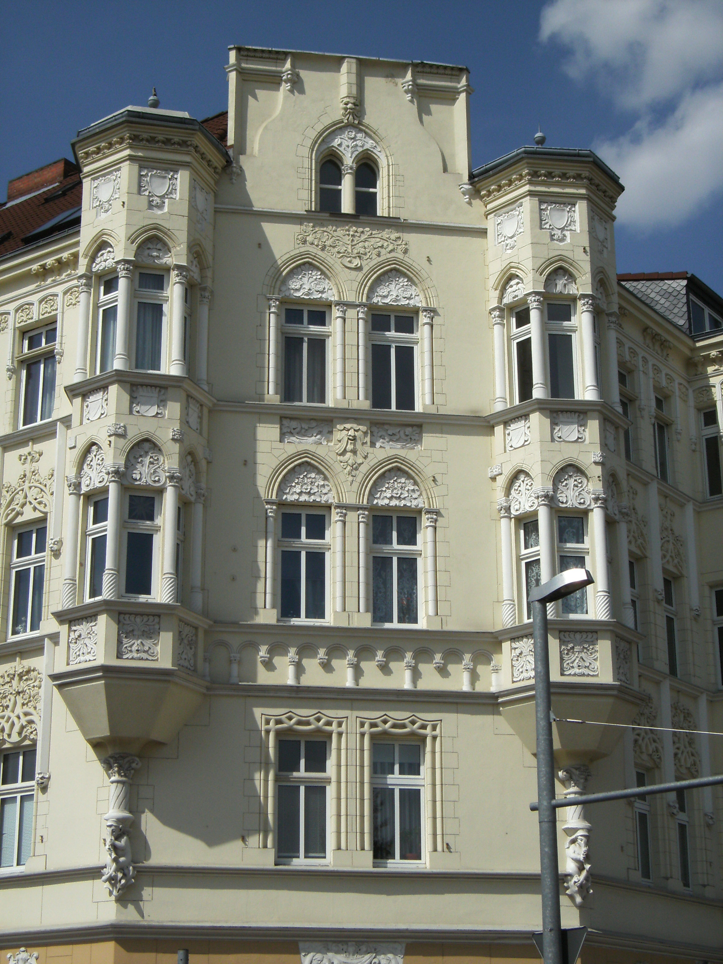 Schillerstraße 33, Bild 2